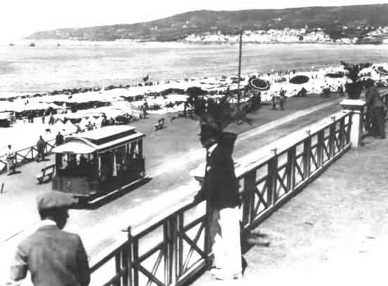 Carro americano da Figueira da Foz, junto à praia.